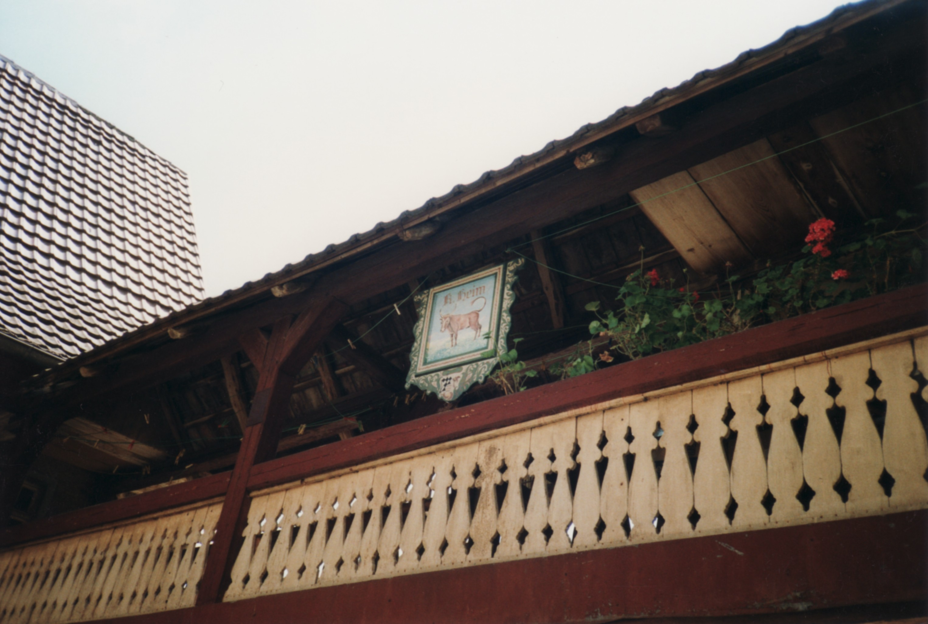 Walddorfhäslach-Walddorf ehemaliger Gasthof zum Ochsen überdachte Brücke zum Saal mit Wirtshausschild